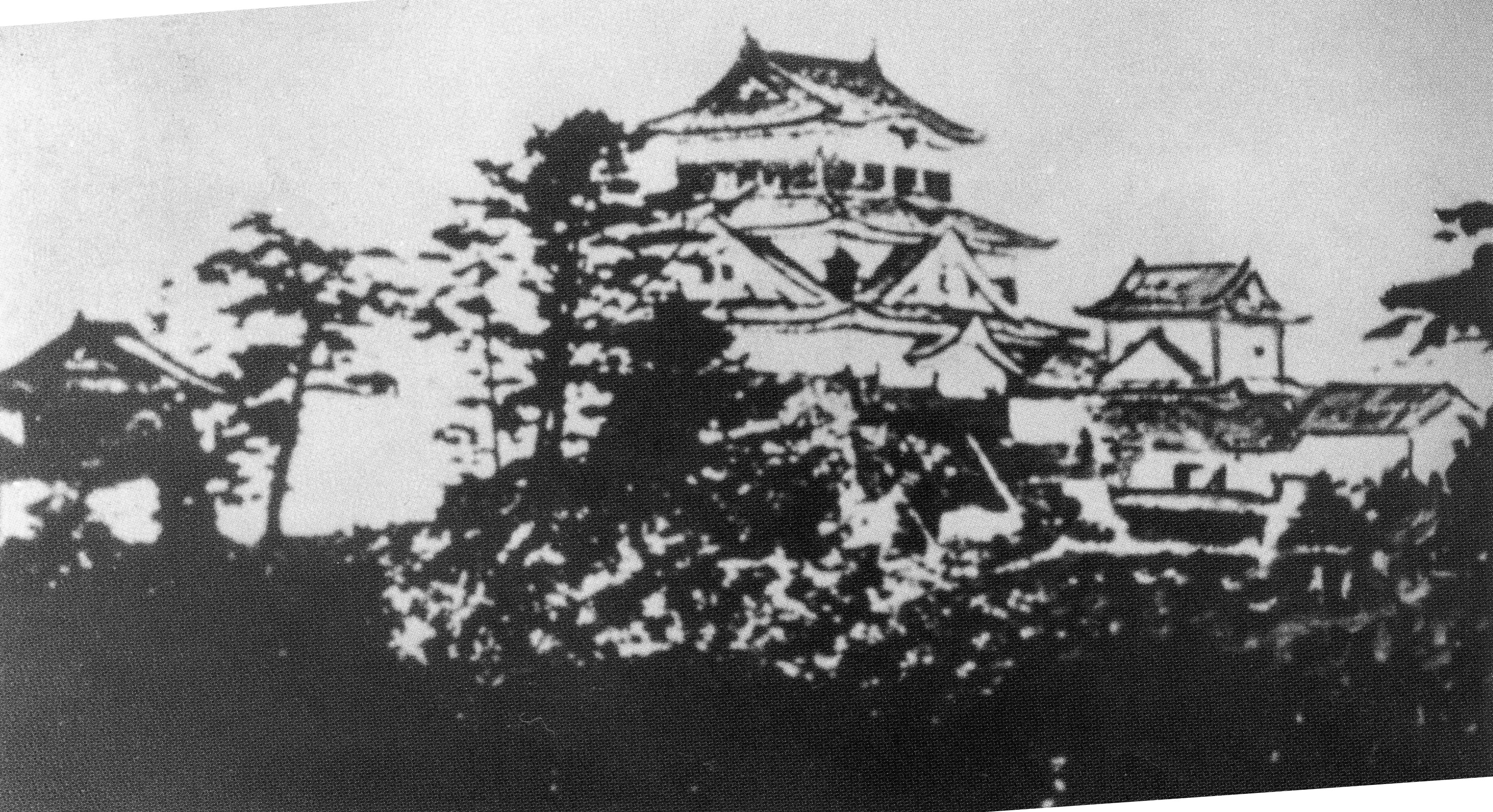 取り壊し前の岡崎城